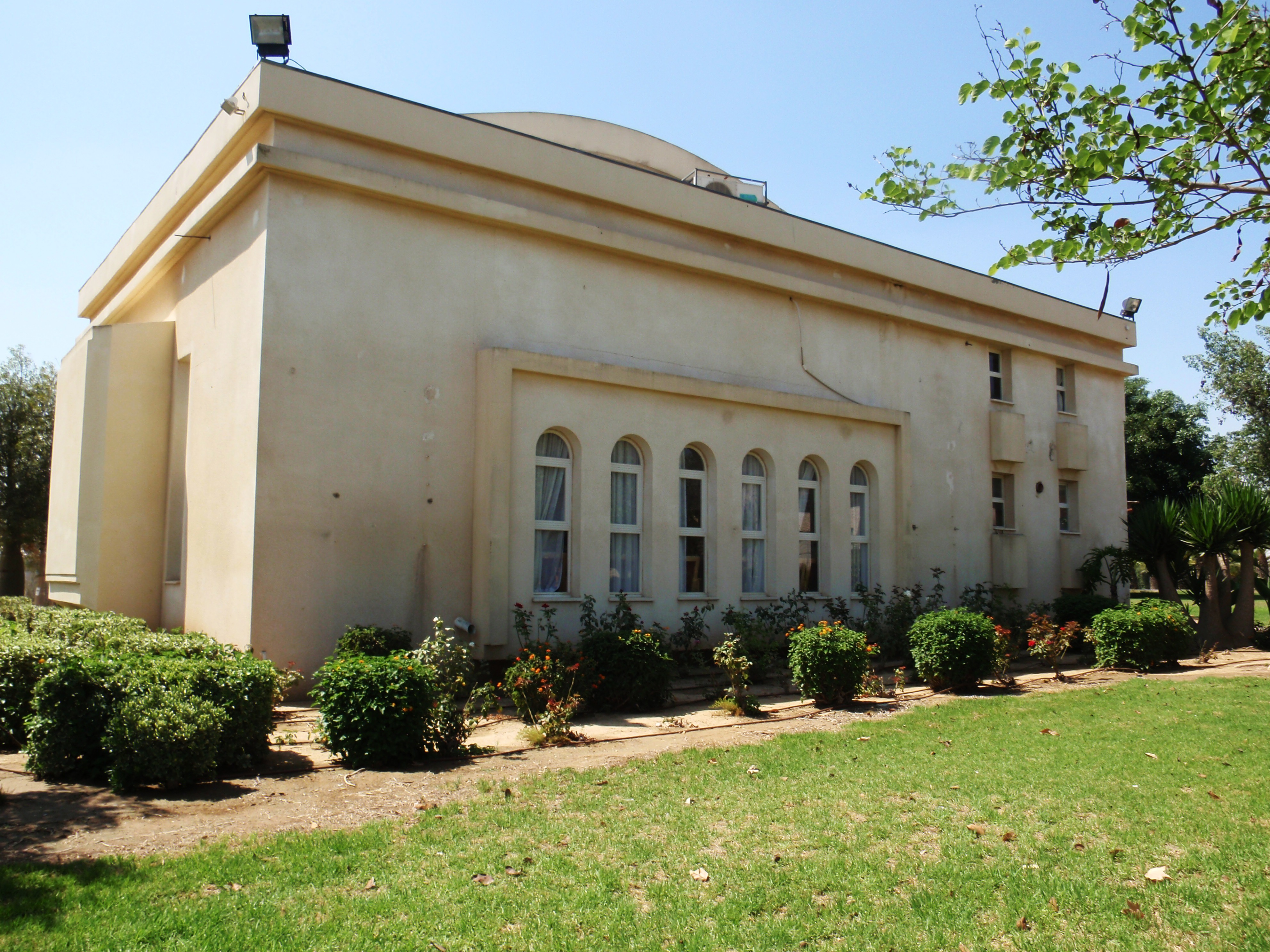 Moshavim פעמי תש"ז בית הכנסת